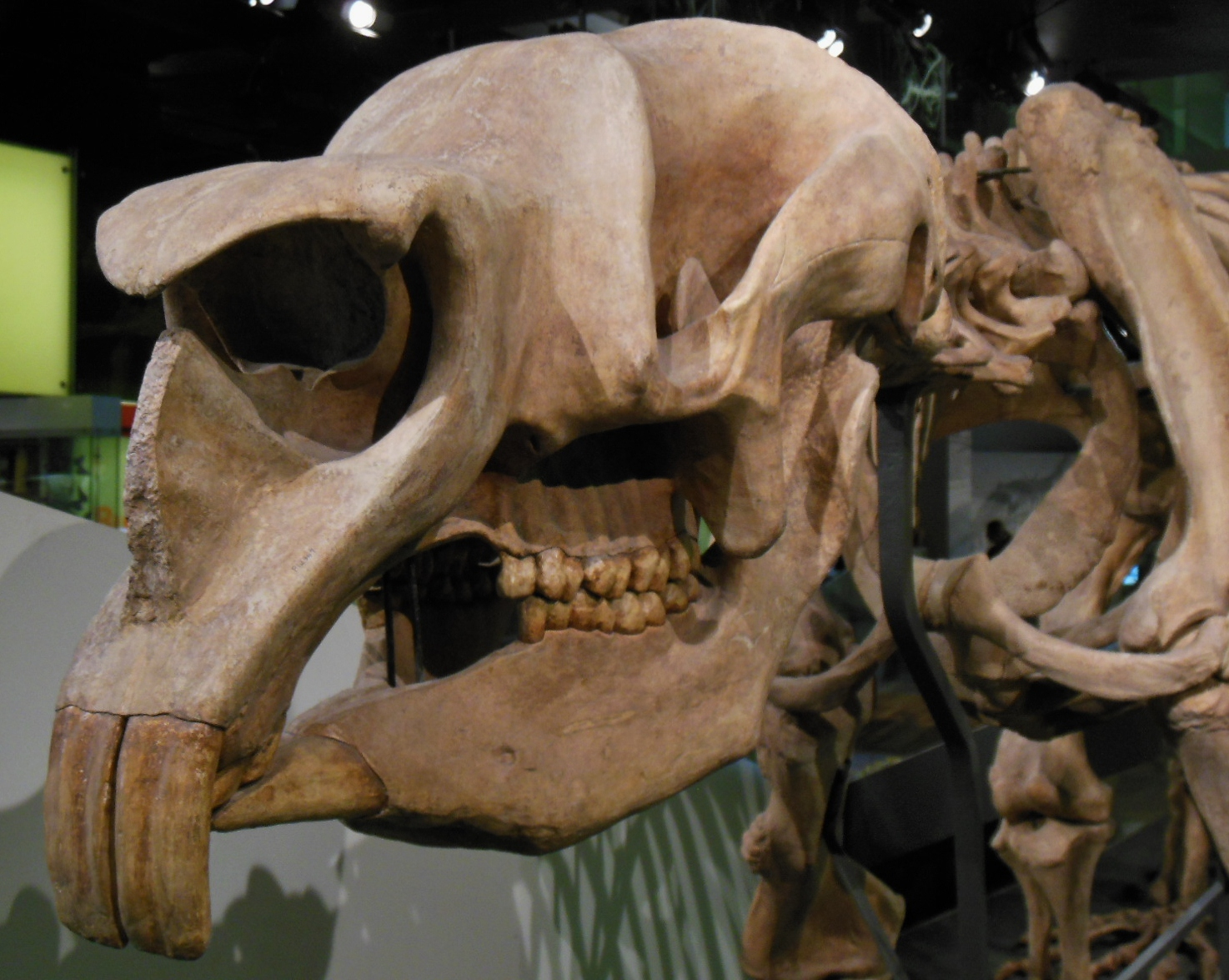 Australian Skull